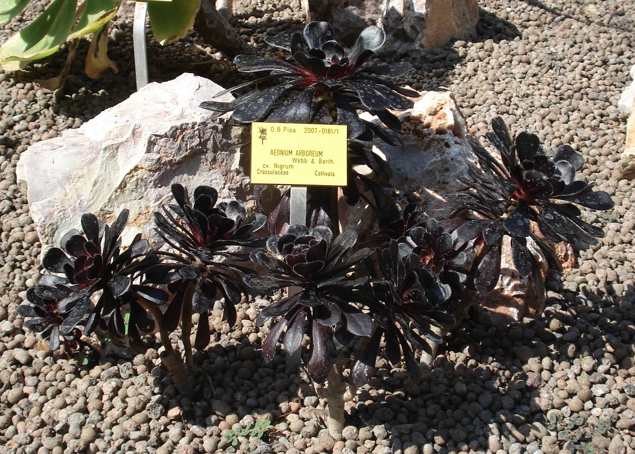 Aeonium arboreum cultivated in Pisa Botanical Garden